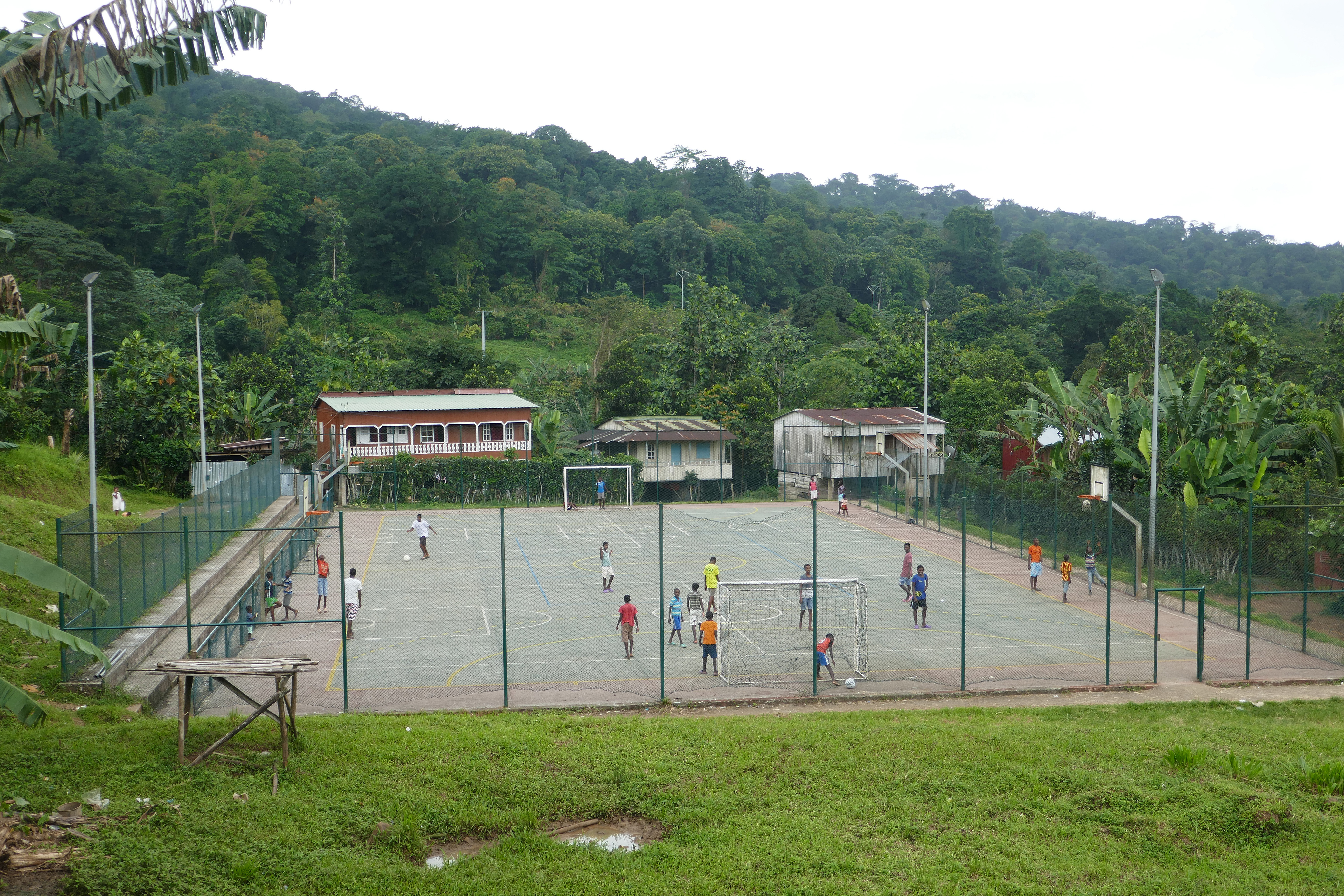 Football à São João dos Angolares au sud-est de l'île de São Tomé (São Tomé-et-Principe). This is an image with the theme "Play" from: Sao Tome and Principe